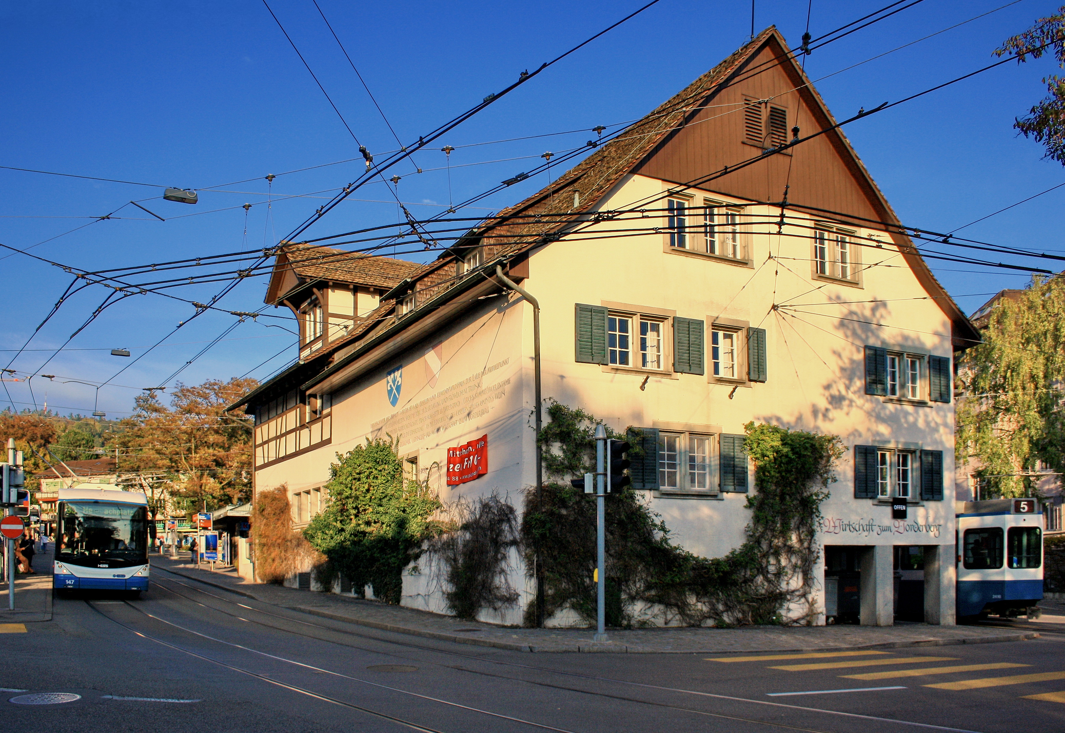 "Gesellenhaus" of the Wirtschaft zum Vorderberg buildings in Zürich-Fluntern